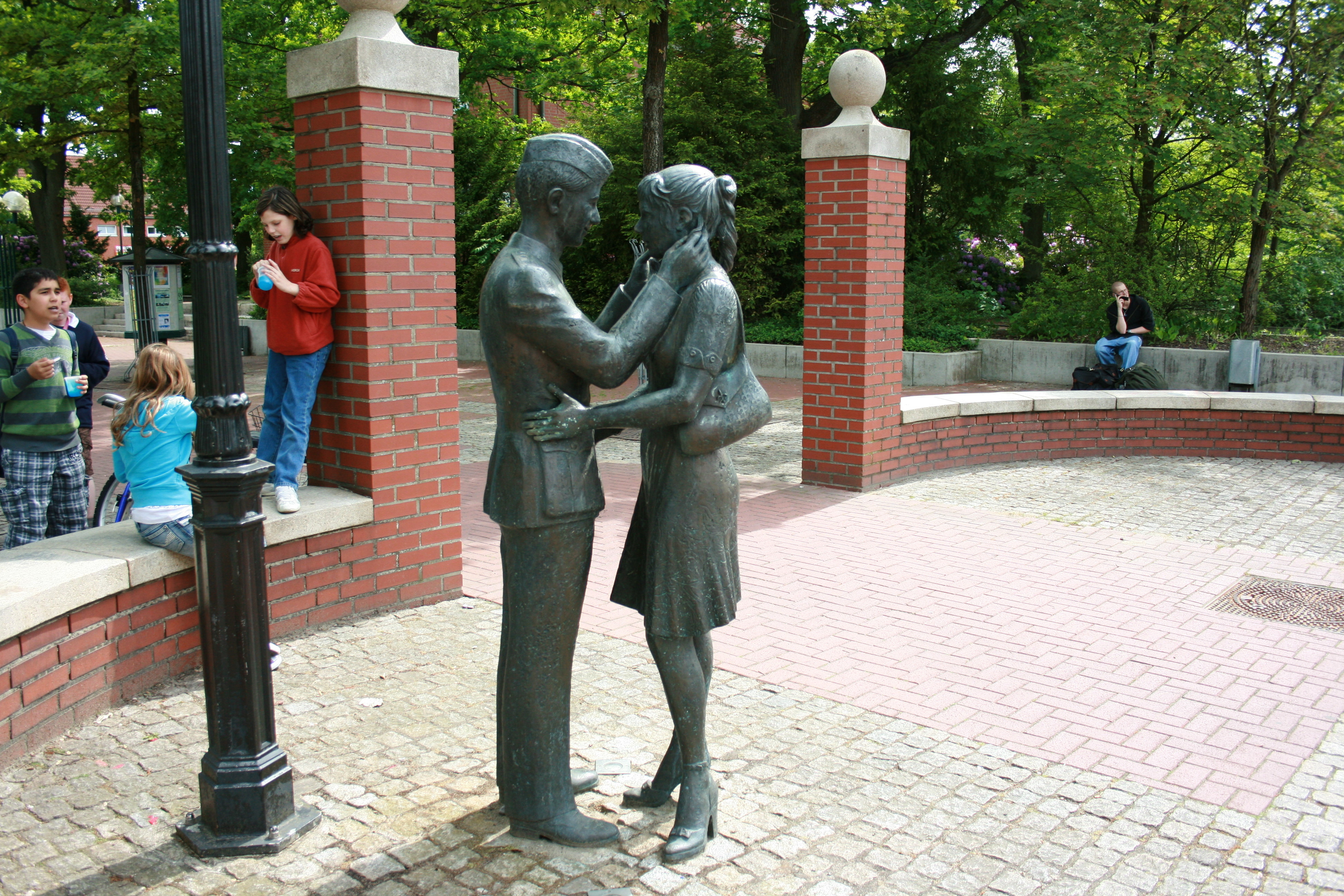 Lili-Marleen-Gruppe von Claus Homfeld auf der Wilhelm-Bockelmann-Straße in Munster (Örtze)